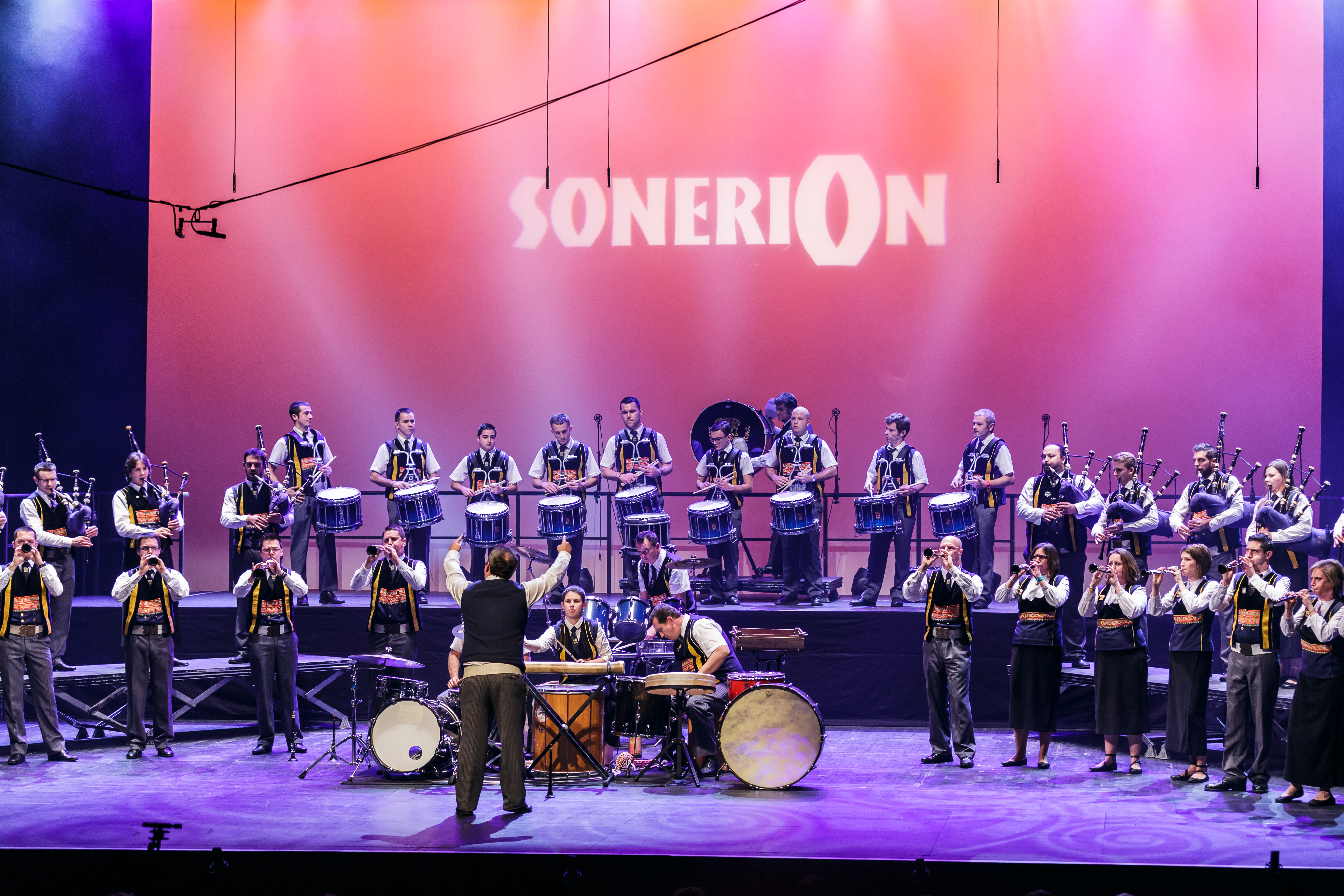 Prestation du bagad Kemper (Quimper) lors de l'épreuve d'hiver du Championnat national des bagadoù de Première catégorie organisée au Quartz à Brest le 12 février 2017.